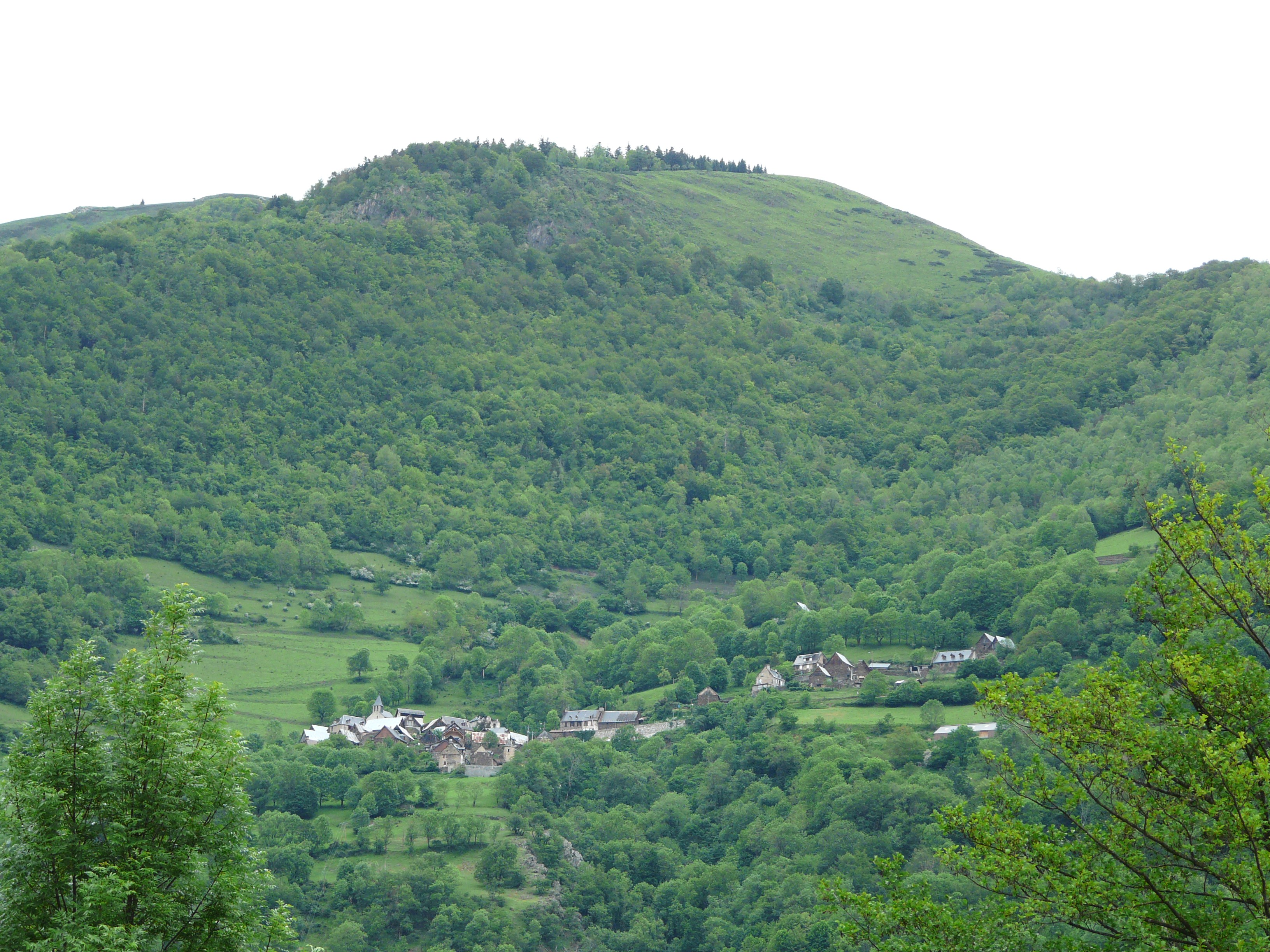 Le village de Sode isolé dans la montagne, Haute-Garonne, France